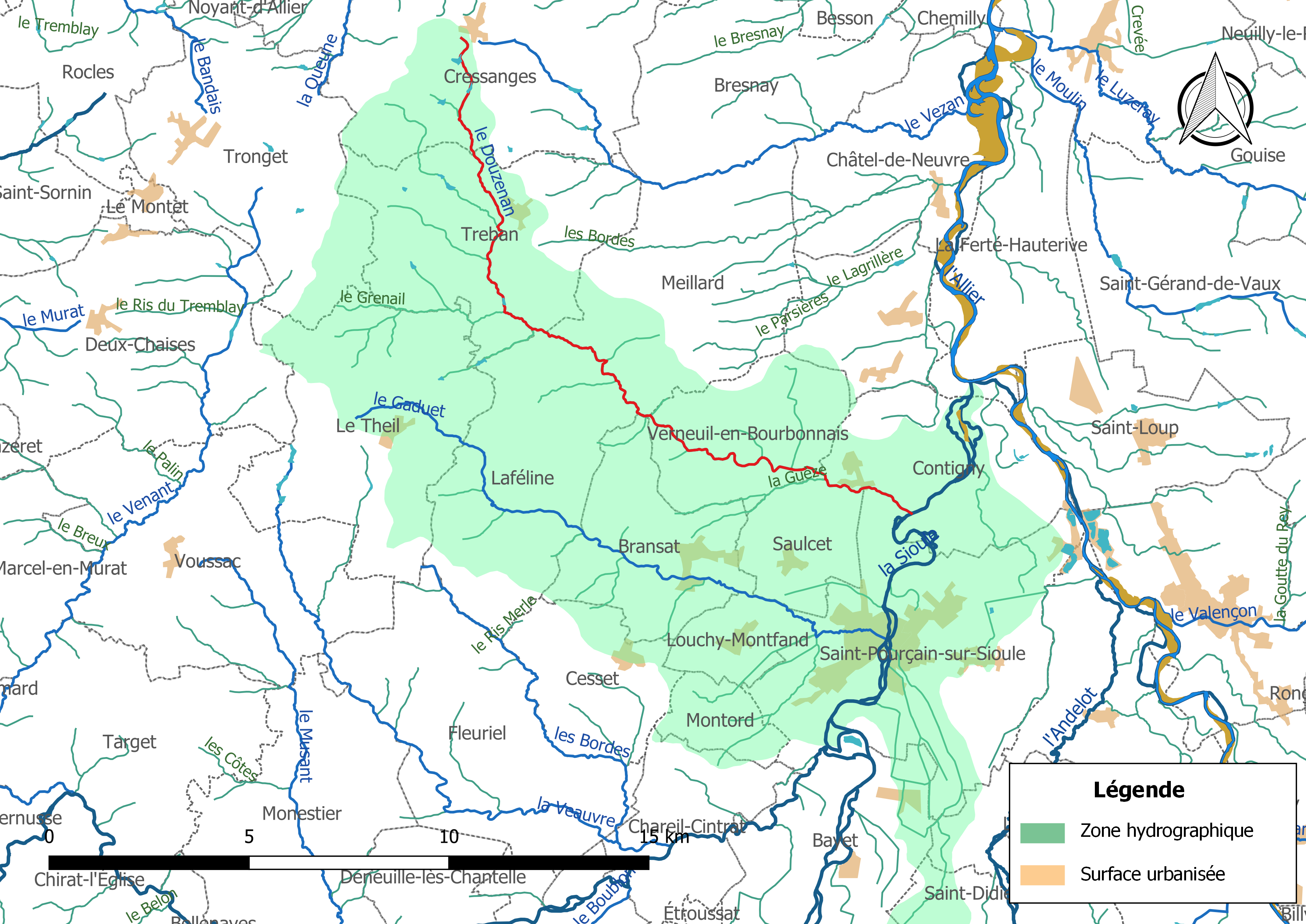 Carte du cours d'eau « le Douzenan » (France) et de la zone hydrographique dans laquelle il s'insère.